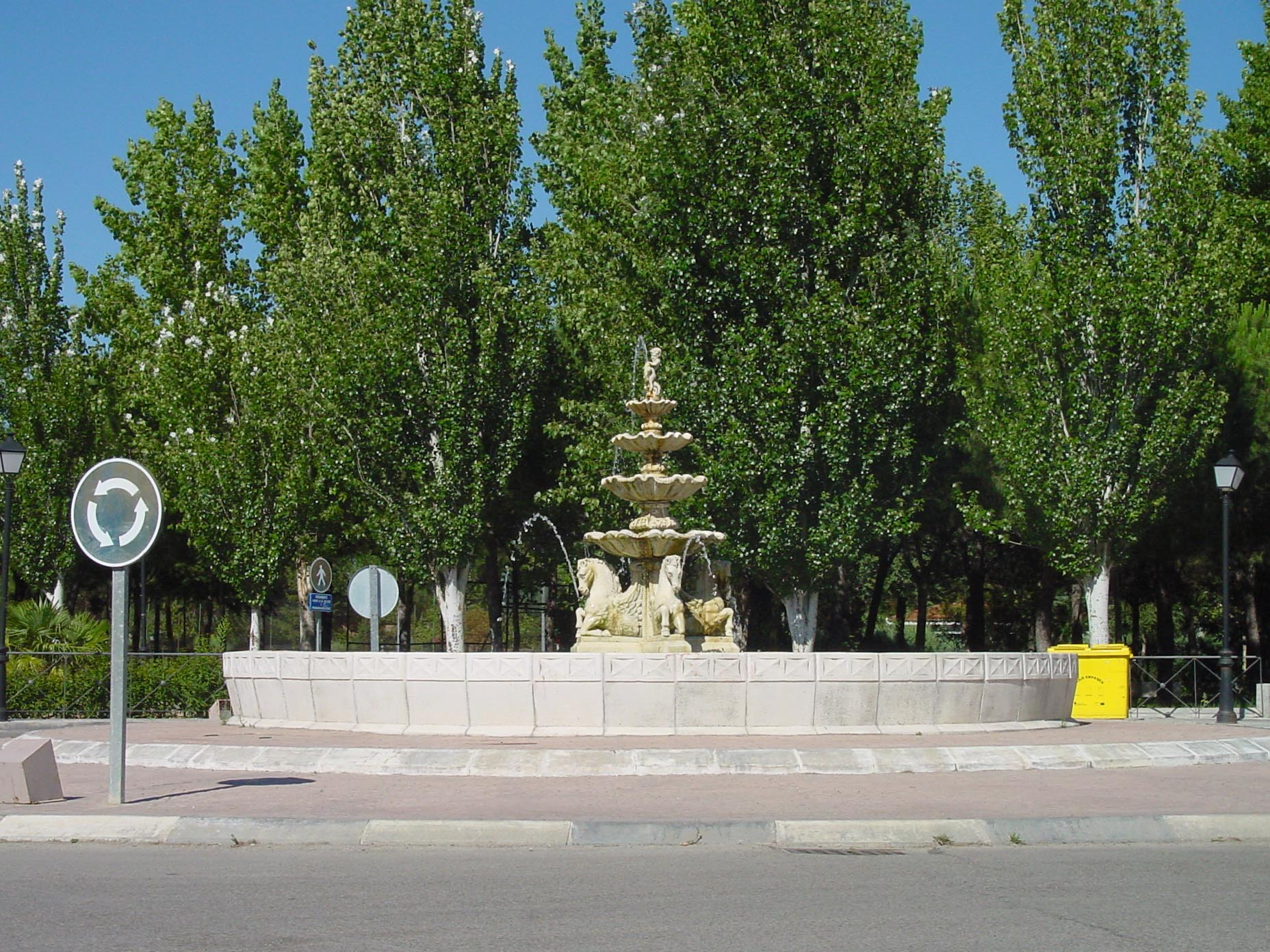 Fuente en parque de Brunete.